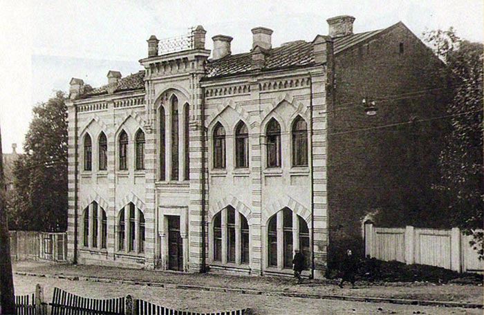 будынак гарадской яўрэйскай бальніцы ў Мінску